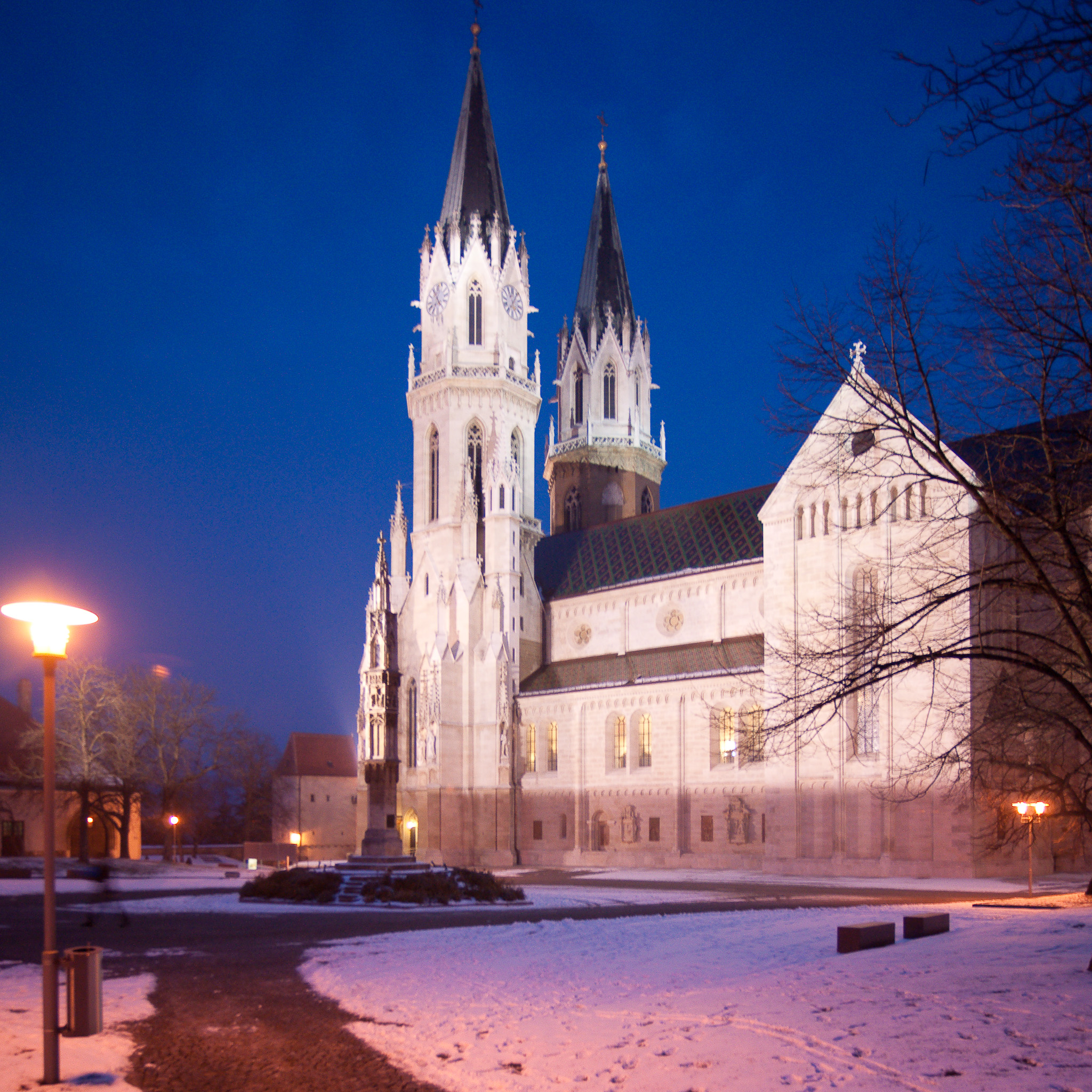 Türme des Stifts Klosterneuburg